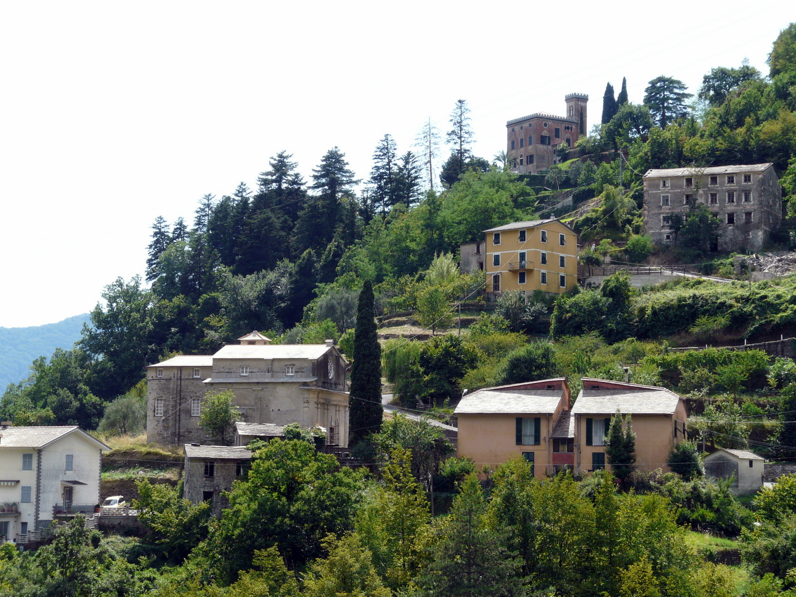 La borgata di Rossarino, Figarolo, Lorsica, Liguria, Italia